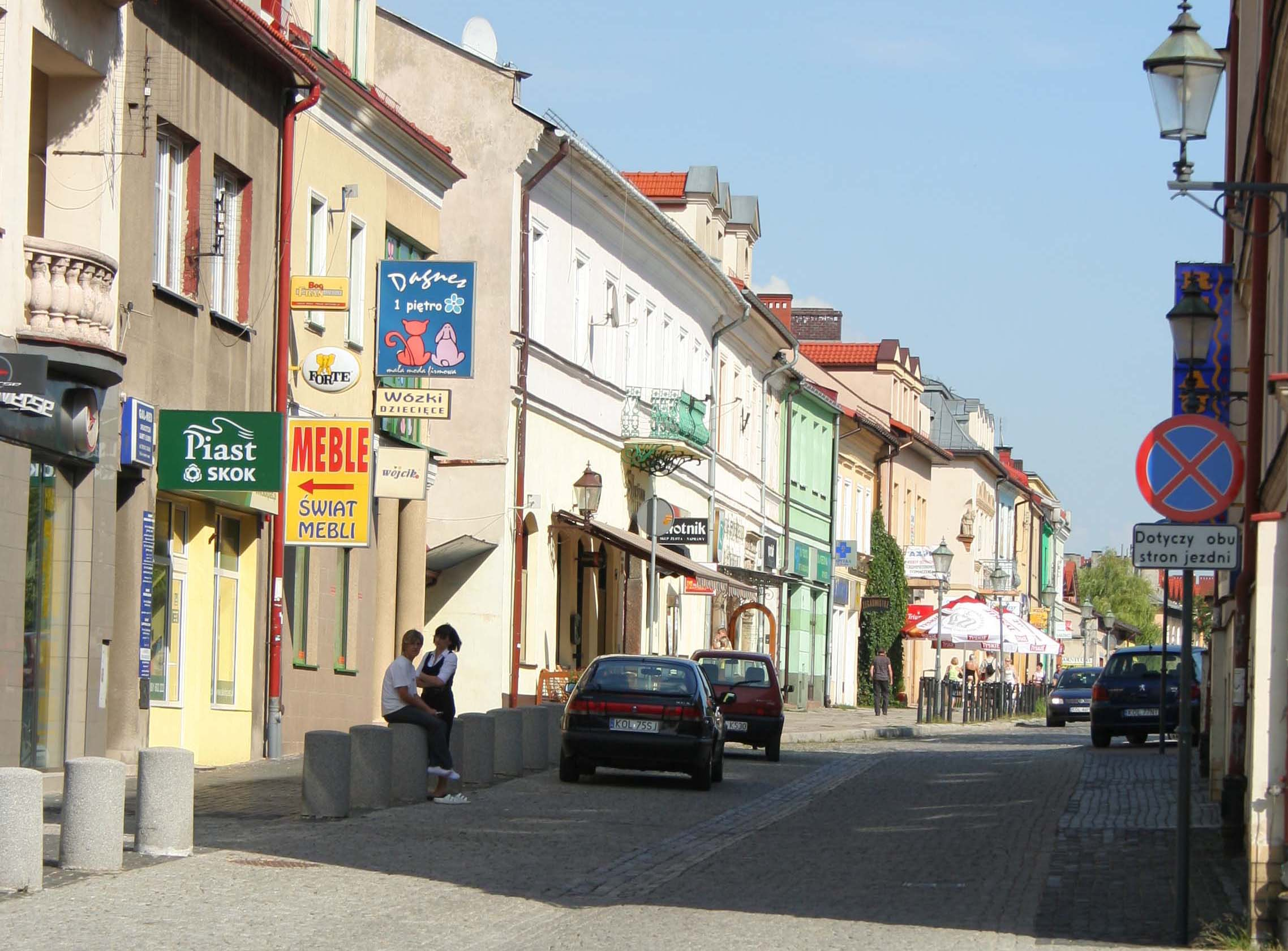 Ul. Sławkowska w Olkuszu